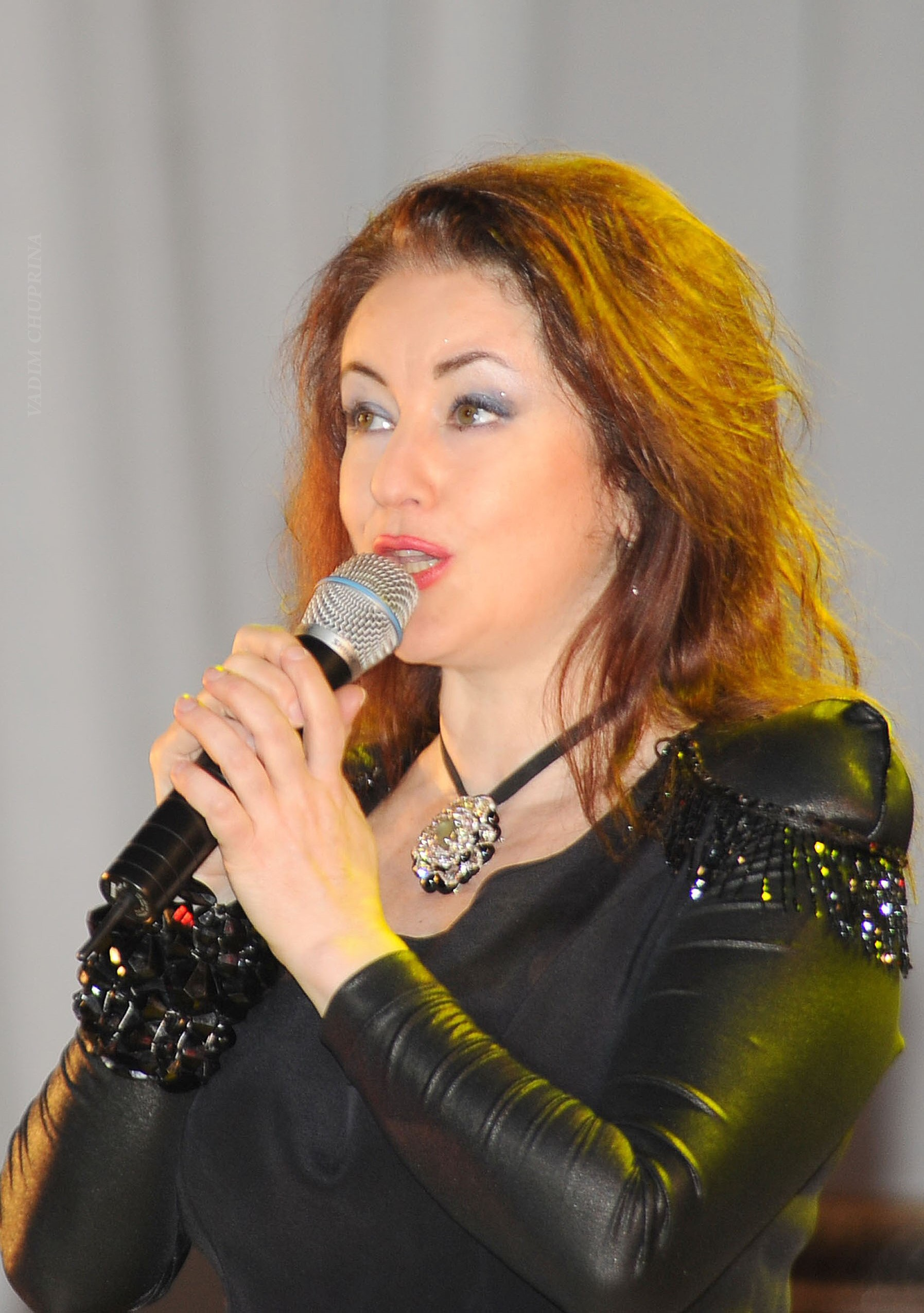 Гвердцители, Тамара Михайловна.Фото Чуприна Вадим